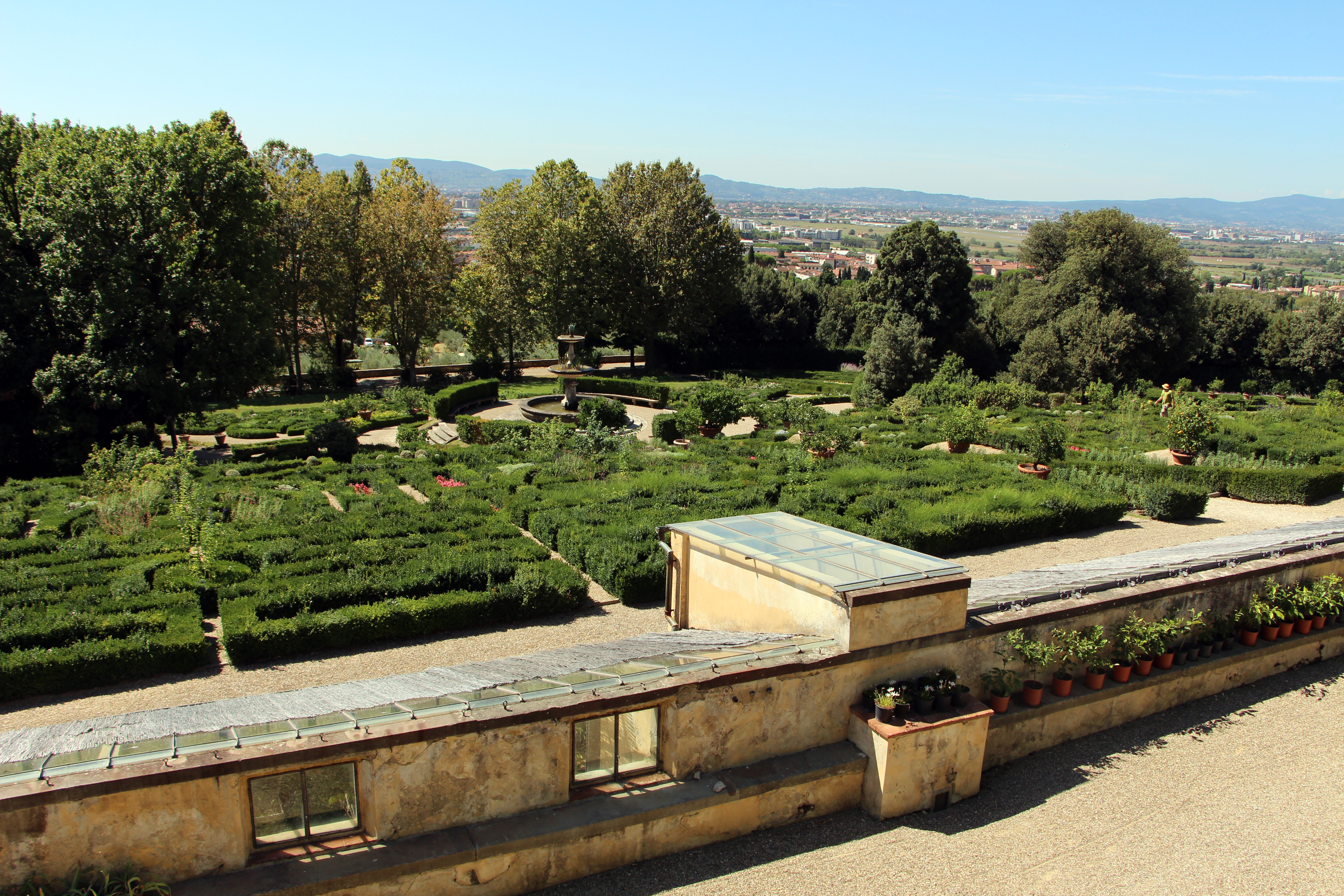 Villa medicea della Petraia - MIBAC The making of this document was supported by Wikimedia CH. (Submit your project!) For all the files concerned, please see the category Supported by Wikimedia CH. This is a photo of a monument which is part of cultural heritage of Italy.